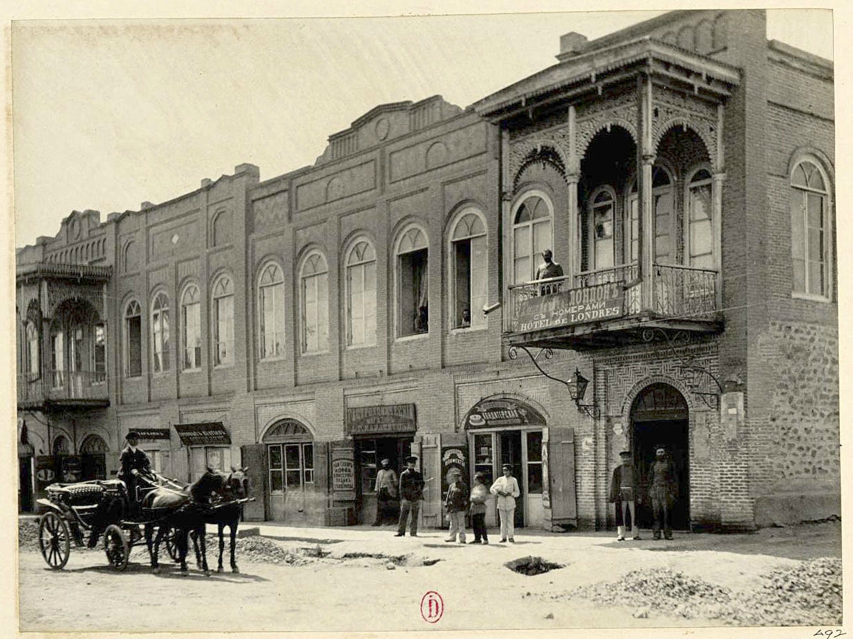 Լոնդոն հյուրանոց (Երևան, 1891)